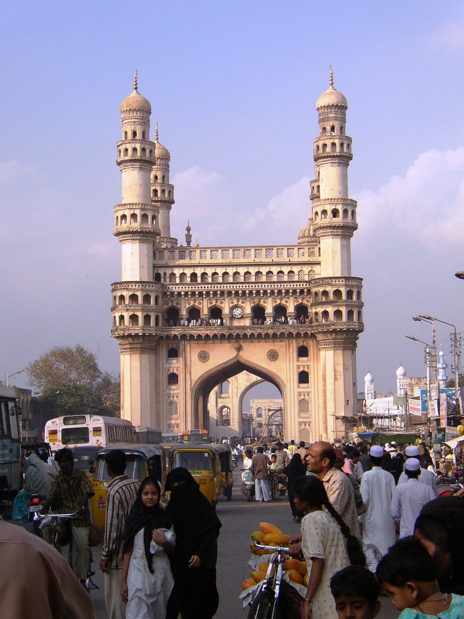 Heydarabad, Charminar